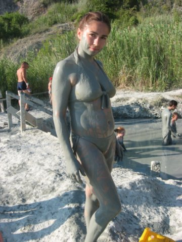 Педагог математики и информатики Татьяна Рыбина в 2009 году, посёлок Лермонтово. Фото в рамках акции #учителятожелюди